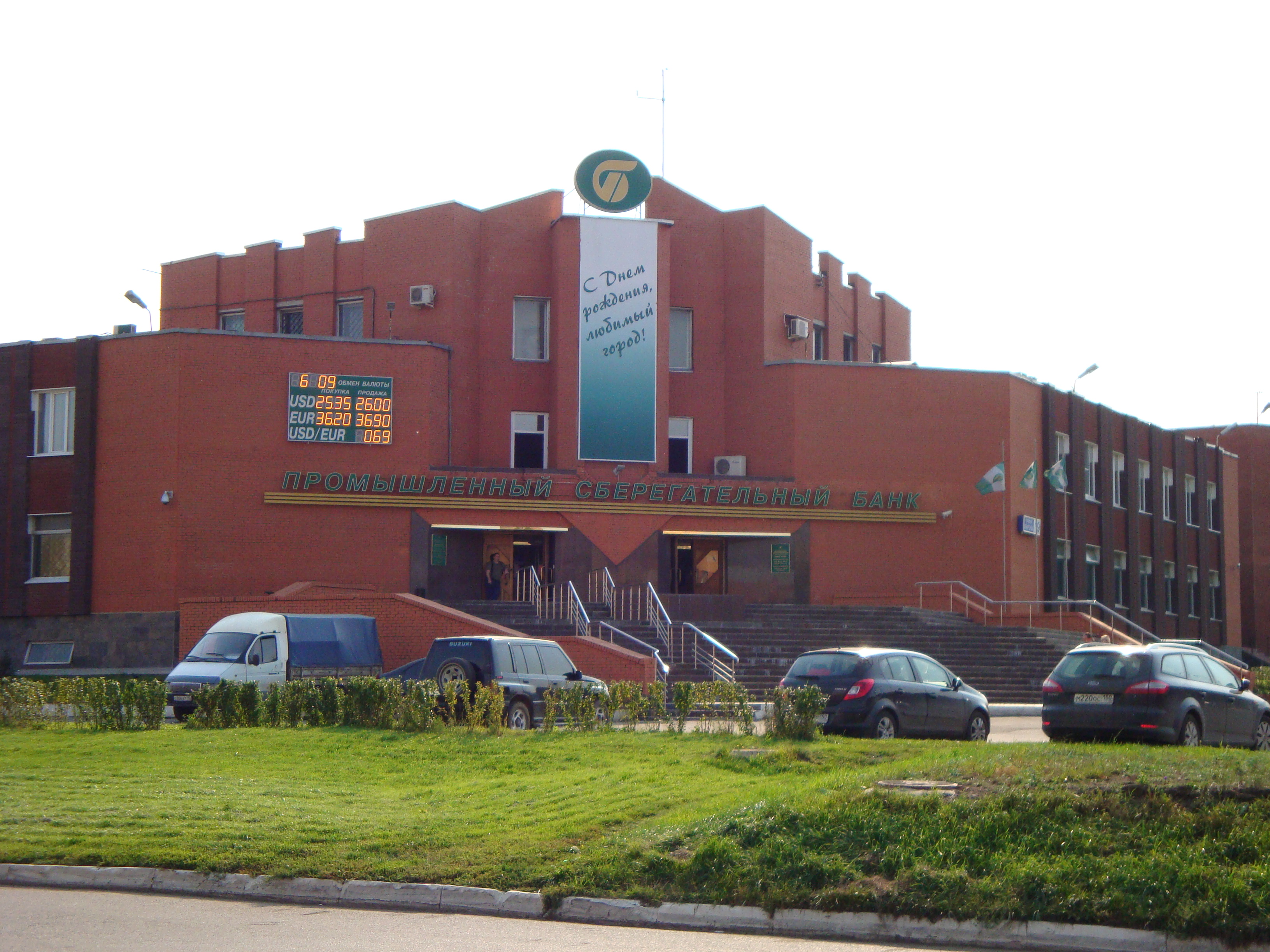 Промышленный сберегательный банк. Центральное отделение в Подольске (Московская область)